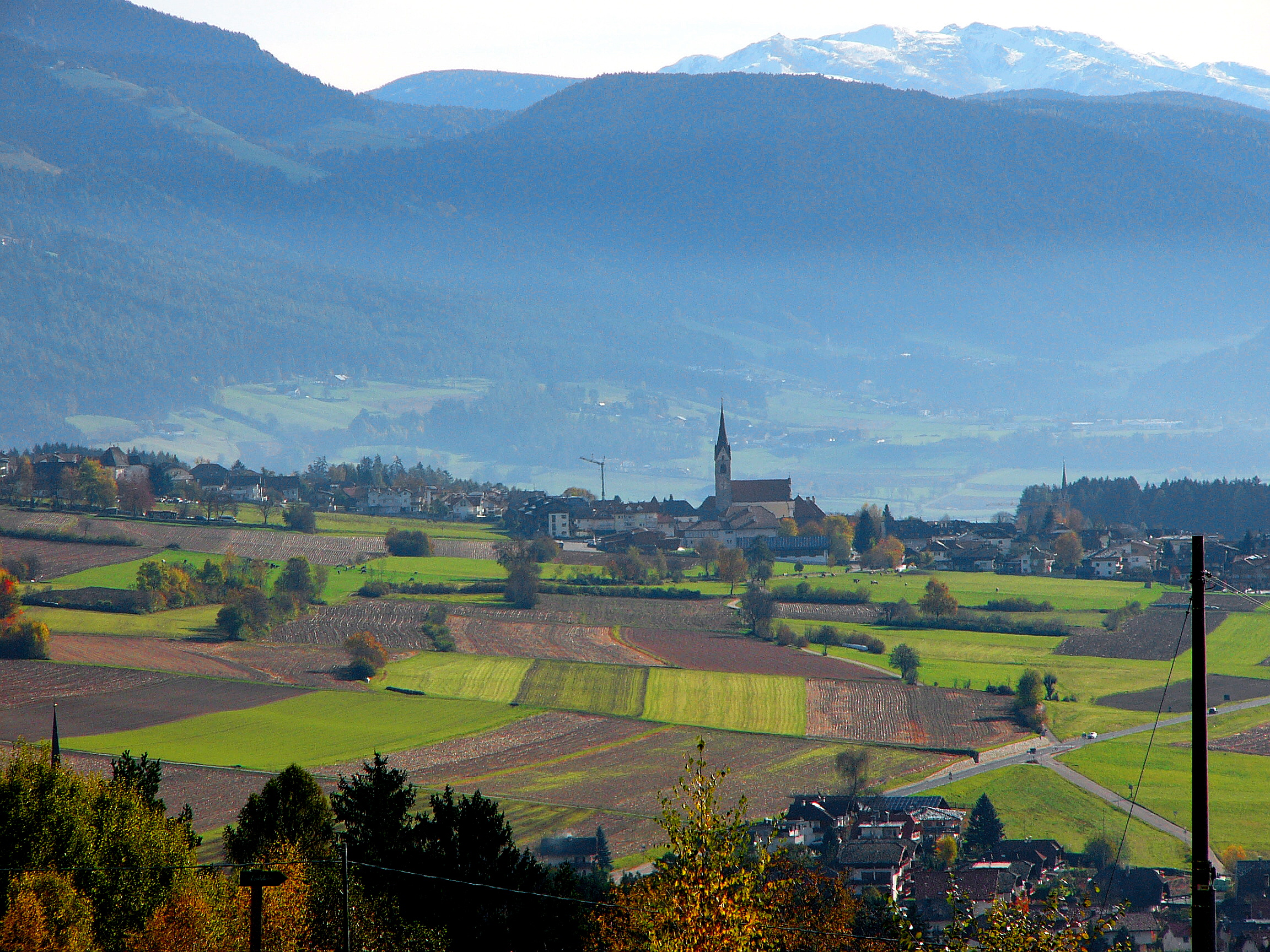 Blick auf Pfalzen in Südtirol